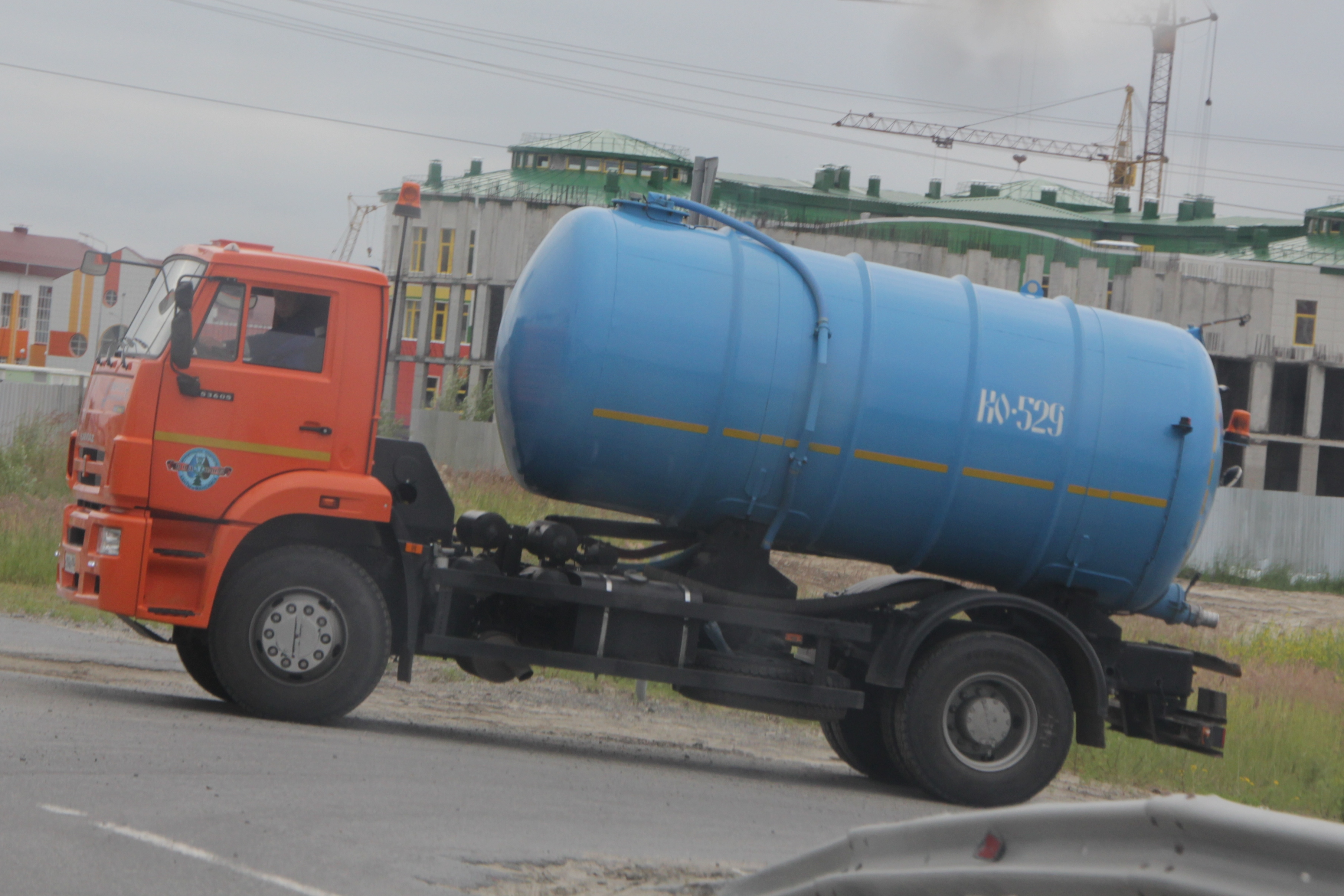 KO-529 Auf Basis eines KamAZ-53605 in Chanti-Mansijsk, Sommer 2014.